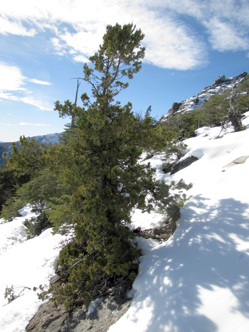 Austrocedrus chilensis en Cerro Peine, Talca, Chile